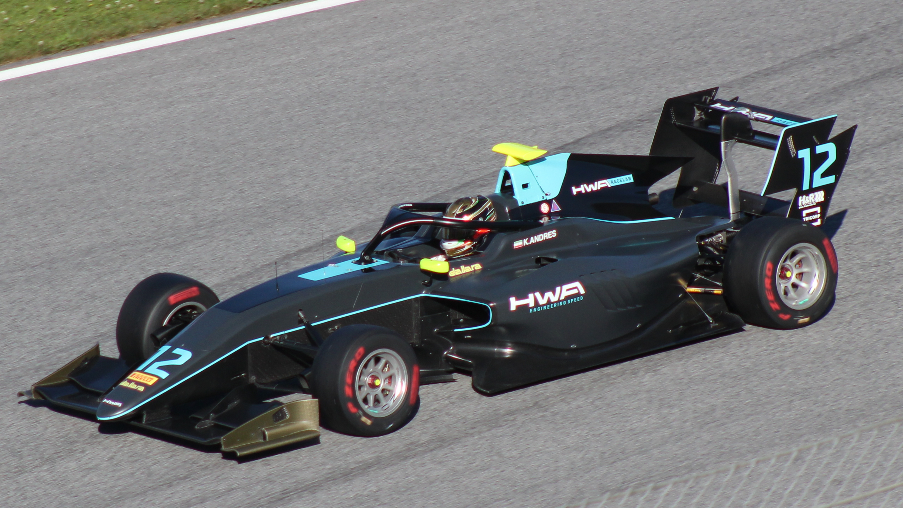 Andres beim Rennwochenende in Österreich 2019